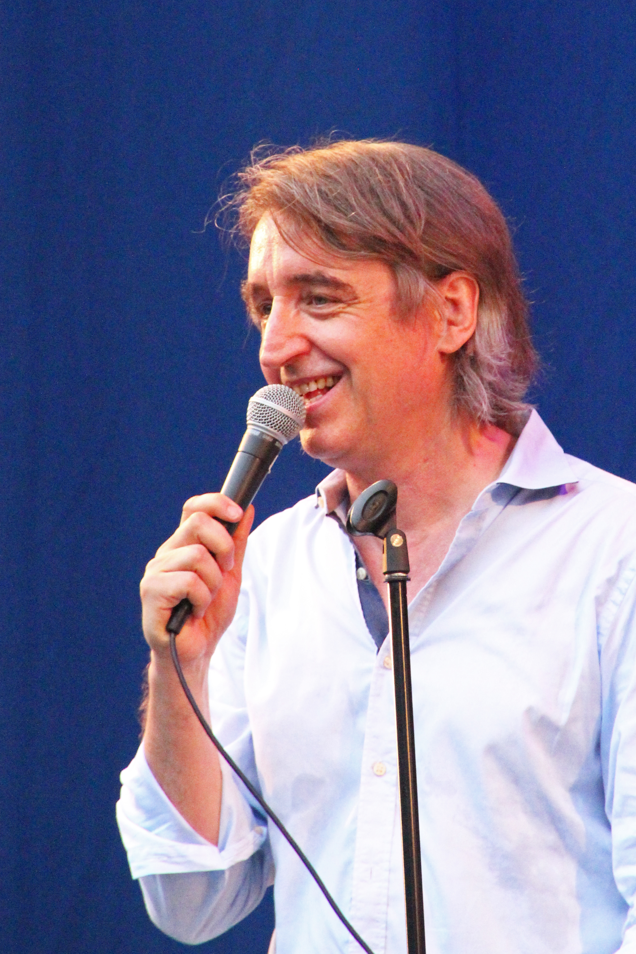 Bildinhalt: Der Jazz-Pianist und Bandleader Christoph Stiefel bei einem Auftritt des Christoph-Stiefel-Septetts im Palmengarten Aufnahmeort: Frankfurt am Main, Deutschland Die dargestellte Person wurde bei einem öffentlichen Auftritt fotografiert.